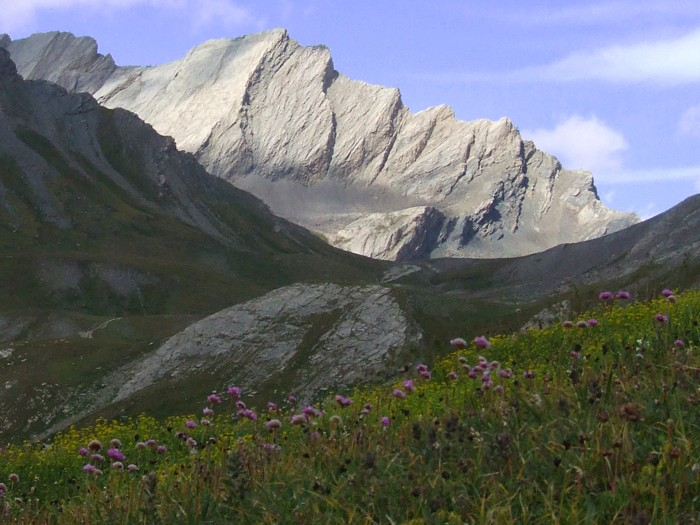 Crete de la Taillante picture taken by user Idéfix August 2006